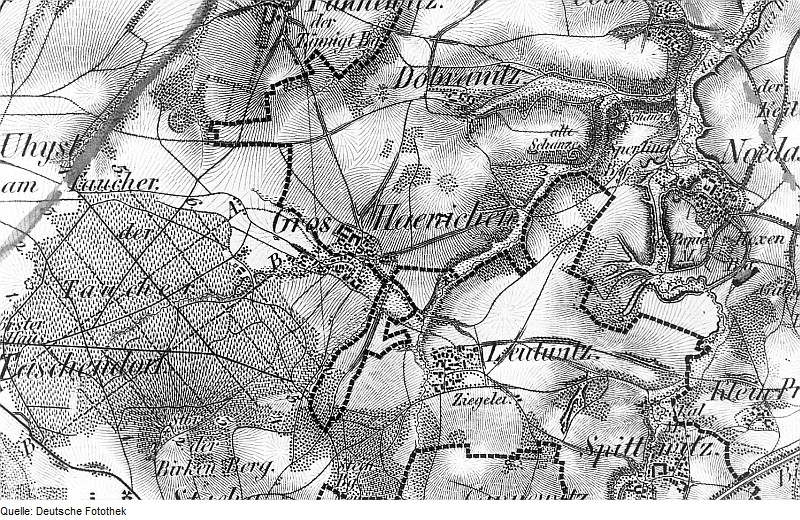 Original image description from the Deutsche Fotothek Burkau-Großhänchen. Oberreit, Sect. Bautzen, 1844/46